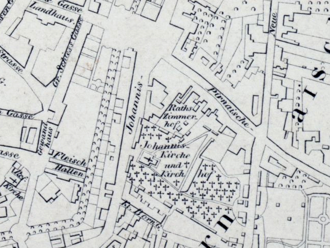 Die alte Johanniskirche in Dresden auf einer Karte aus dem Jahr 1828